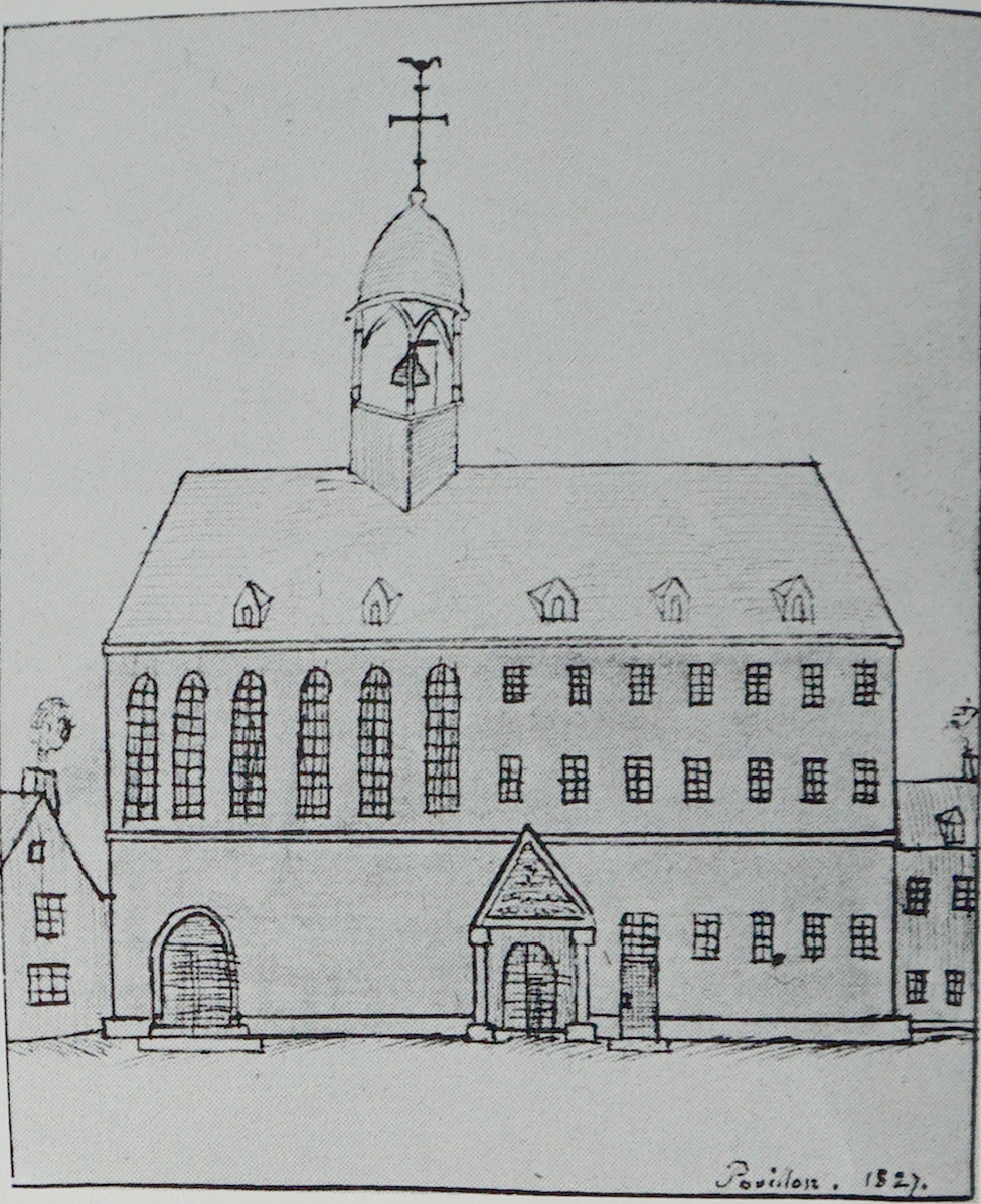 vue de l'ancien hopital st-Antoine.